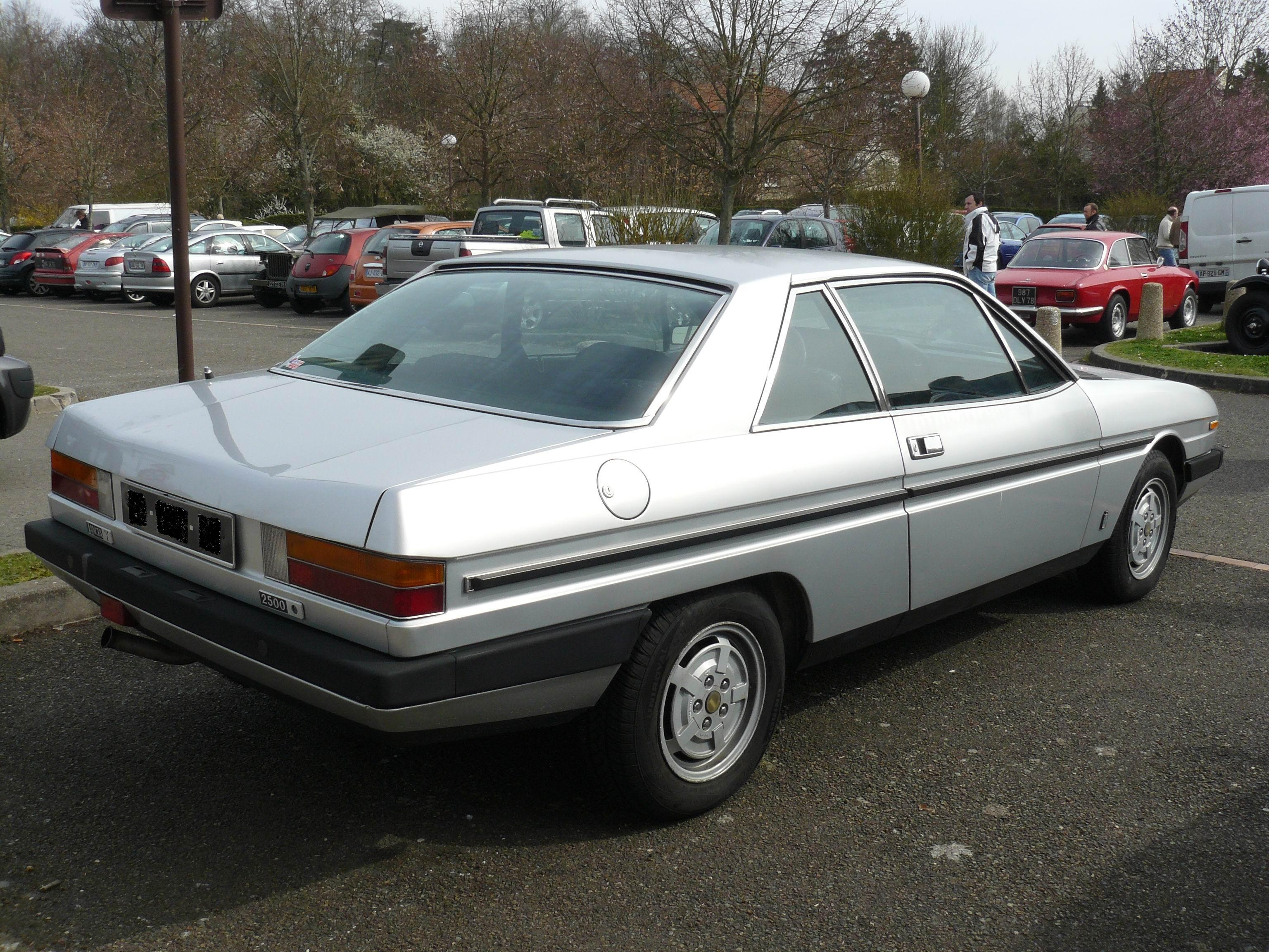 Bailly 2011